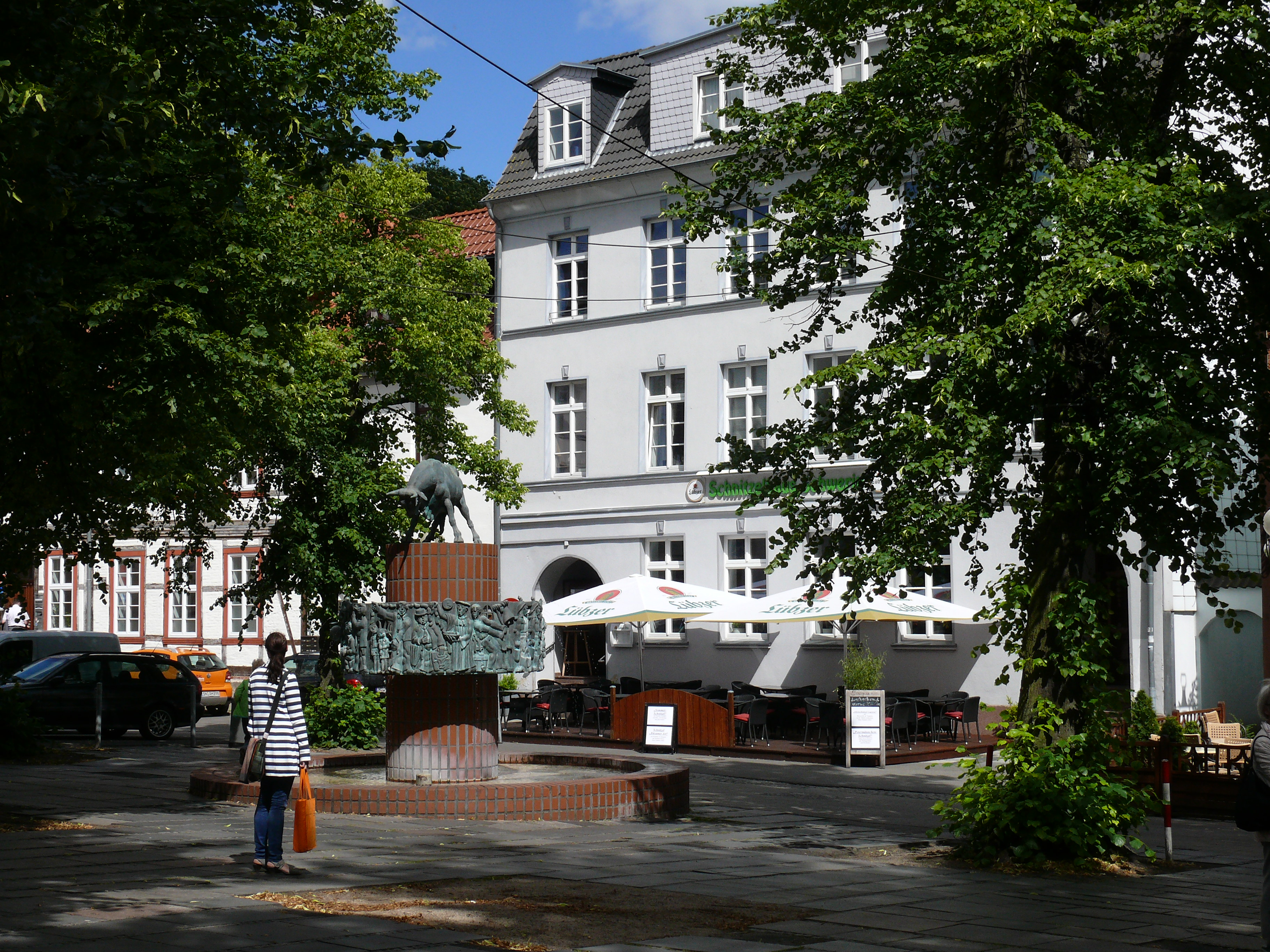 Das Gebäude "Schlachterstraße 15" in Schwerin.